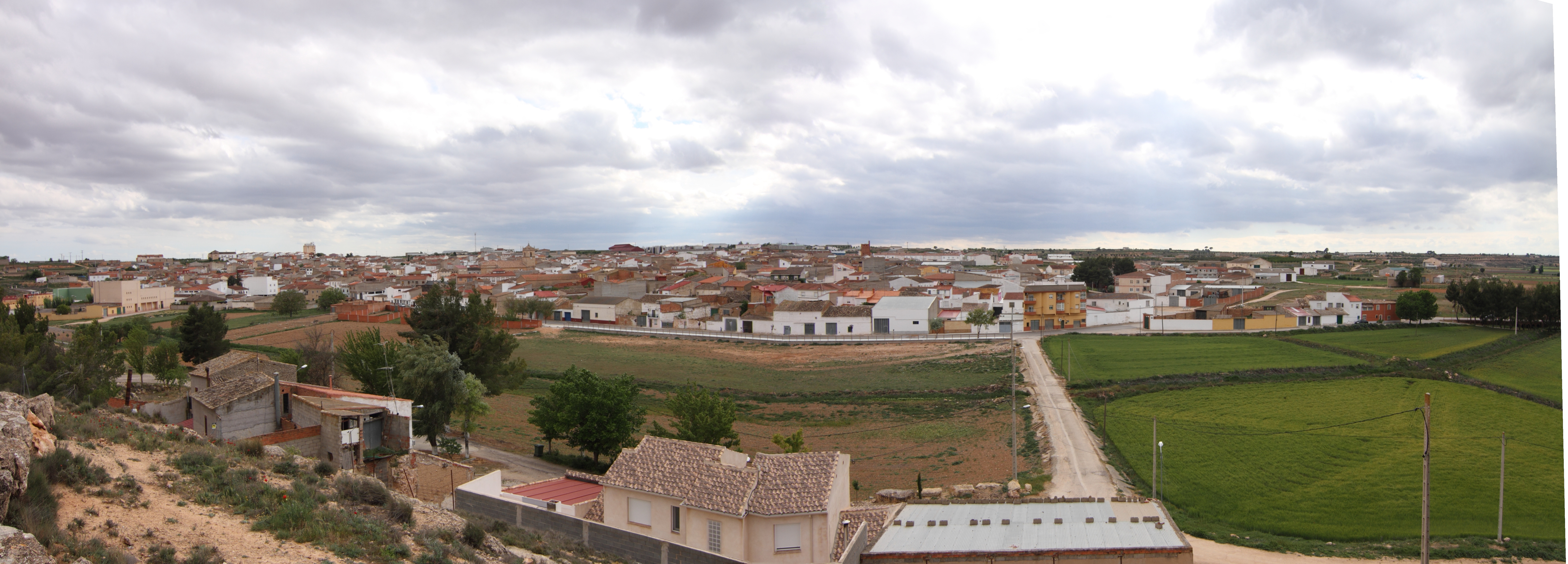 Ledaña, Panorámica desde el molino